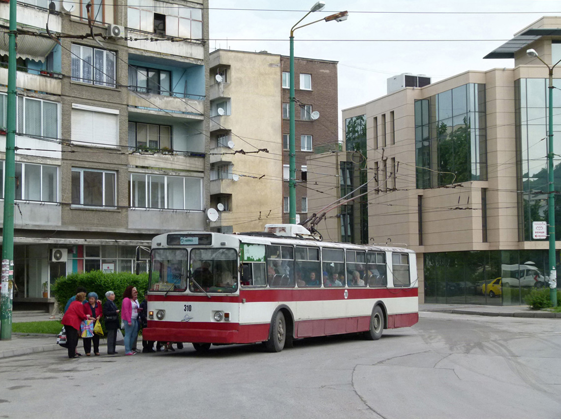 Тролейбус ЗиУ-9 в Габрово